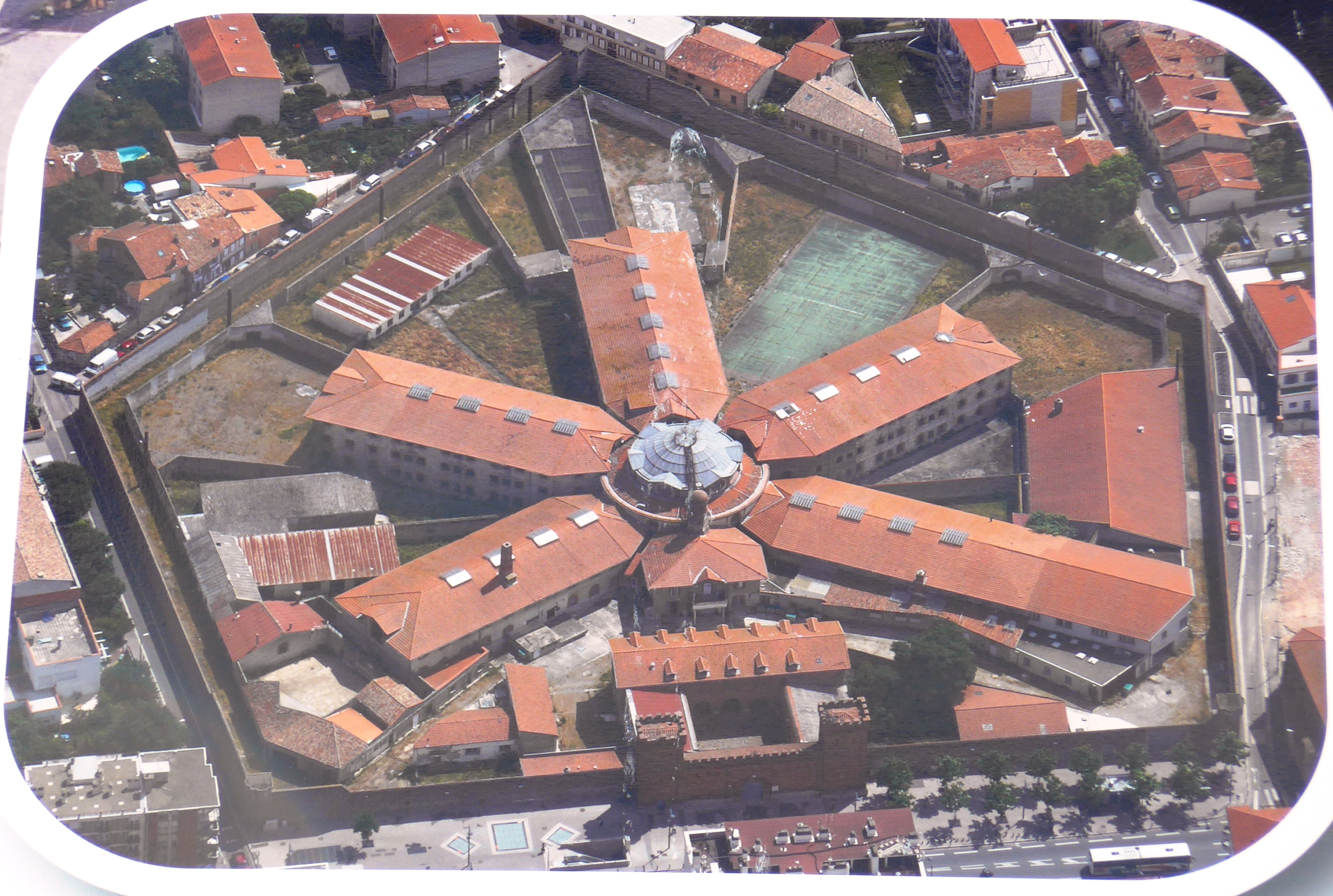 Prison Saint-Michel (Toulouse), Le futur musée de la résistance de Toulouse. Probablement une bonne idée, en espérant qu'elle ne redevienne jamais un lieu d'enfermement, en endroit où l'on tire sur les fugitifs du haut du mirador. .